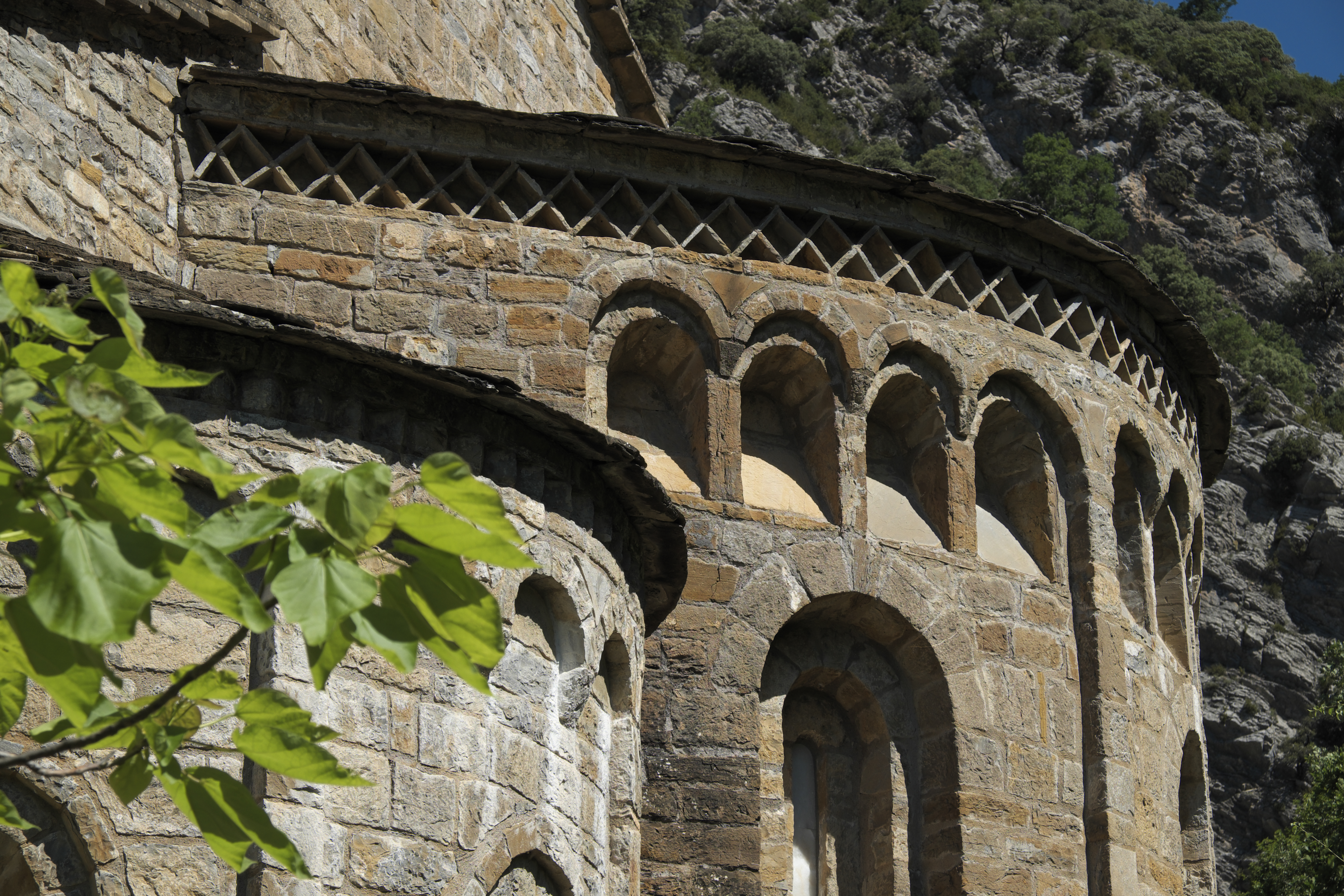 Ehemalige Benediktinerklosterkirche Santa María des Klosters Santa María de Obarra in Beranuy in der Provinz Huesca (Aragón/Spanien), Blendarkaden der Hauptapsis